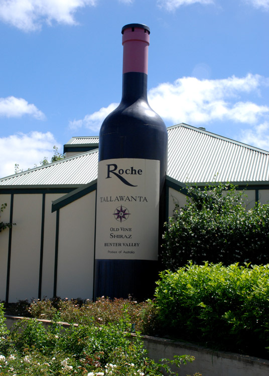 Big Wine Bottle at Hunter Valley Gardens, Pokolbin (NSW).